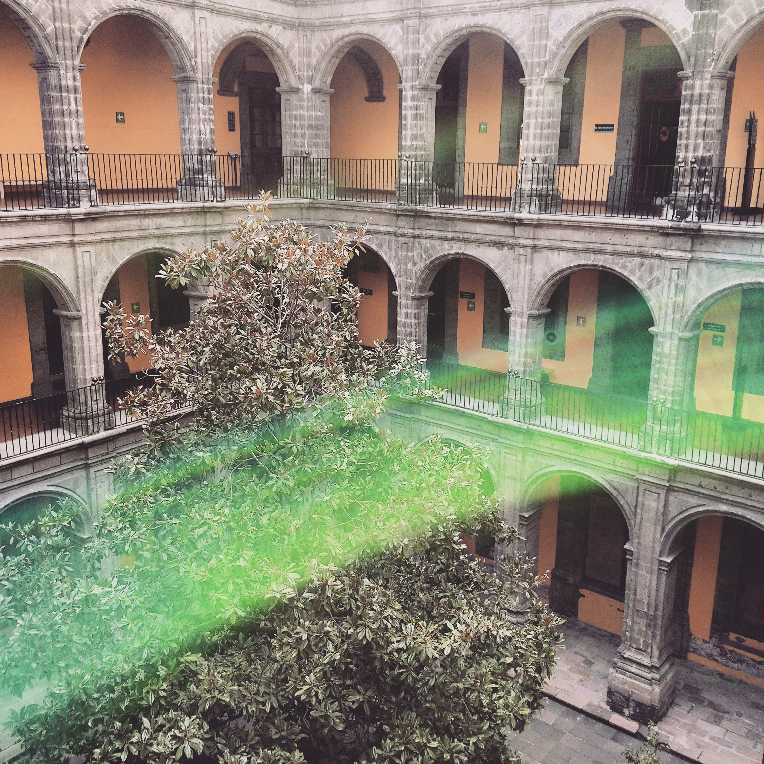 Patio Chico del Antiguo Colegio de San Ildefonso